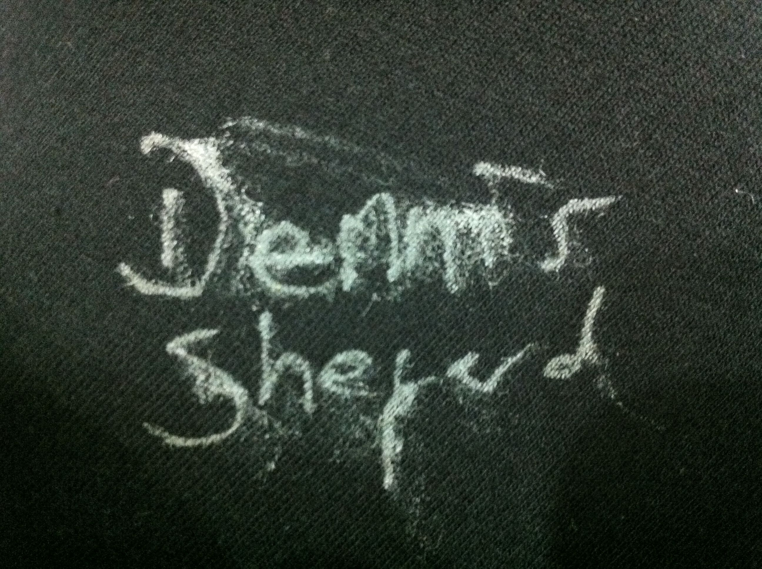 Подпис на Денис Шепърд